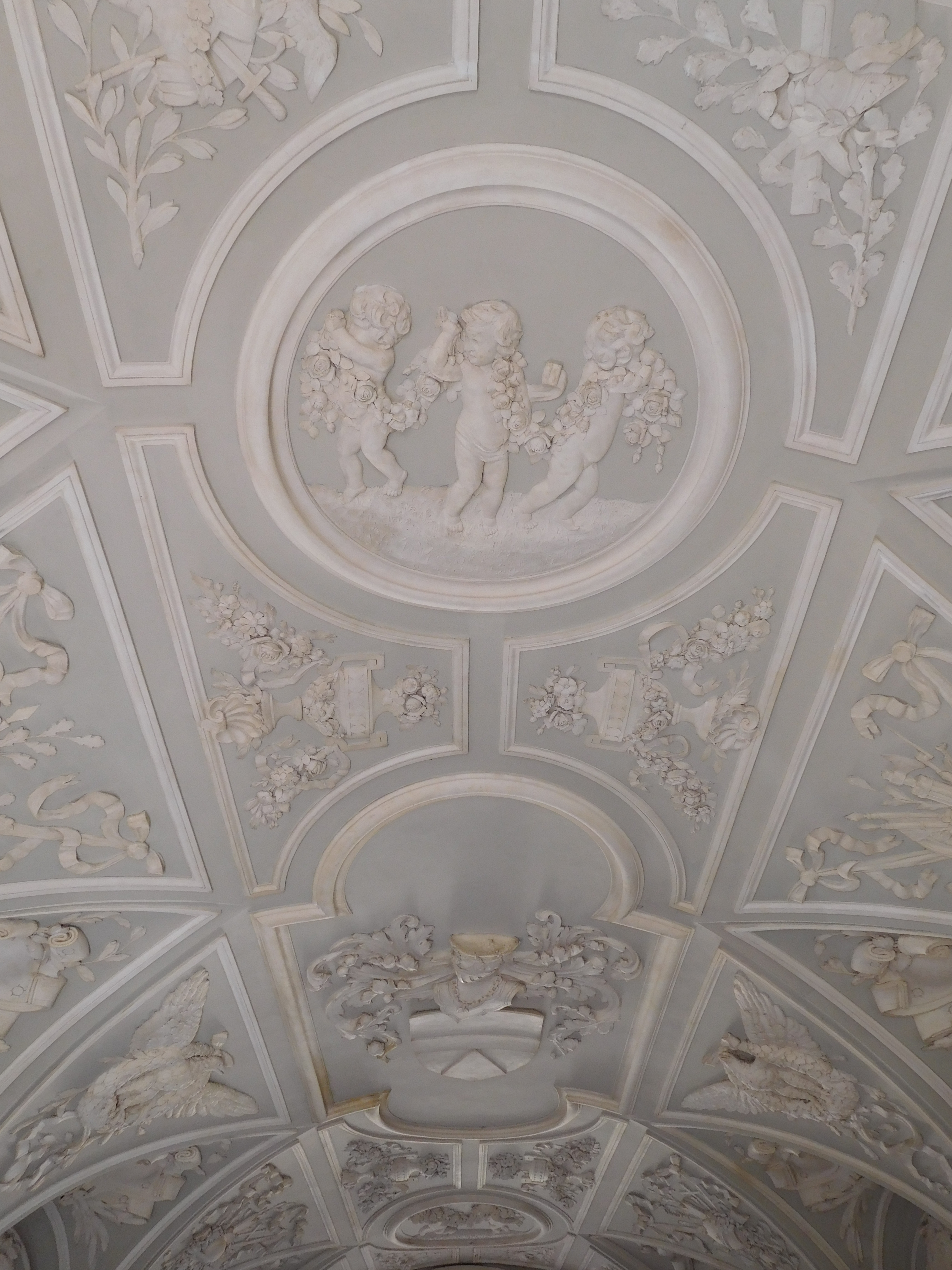 Soffitto dell'atrio di Palazzo Mazara, Sulmona